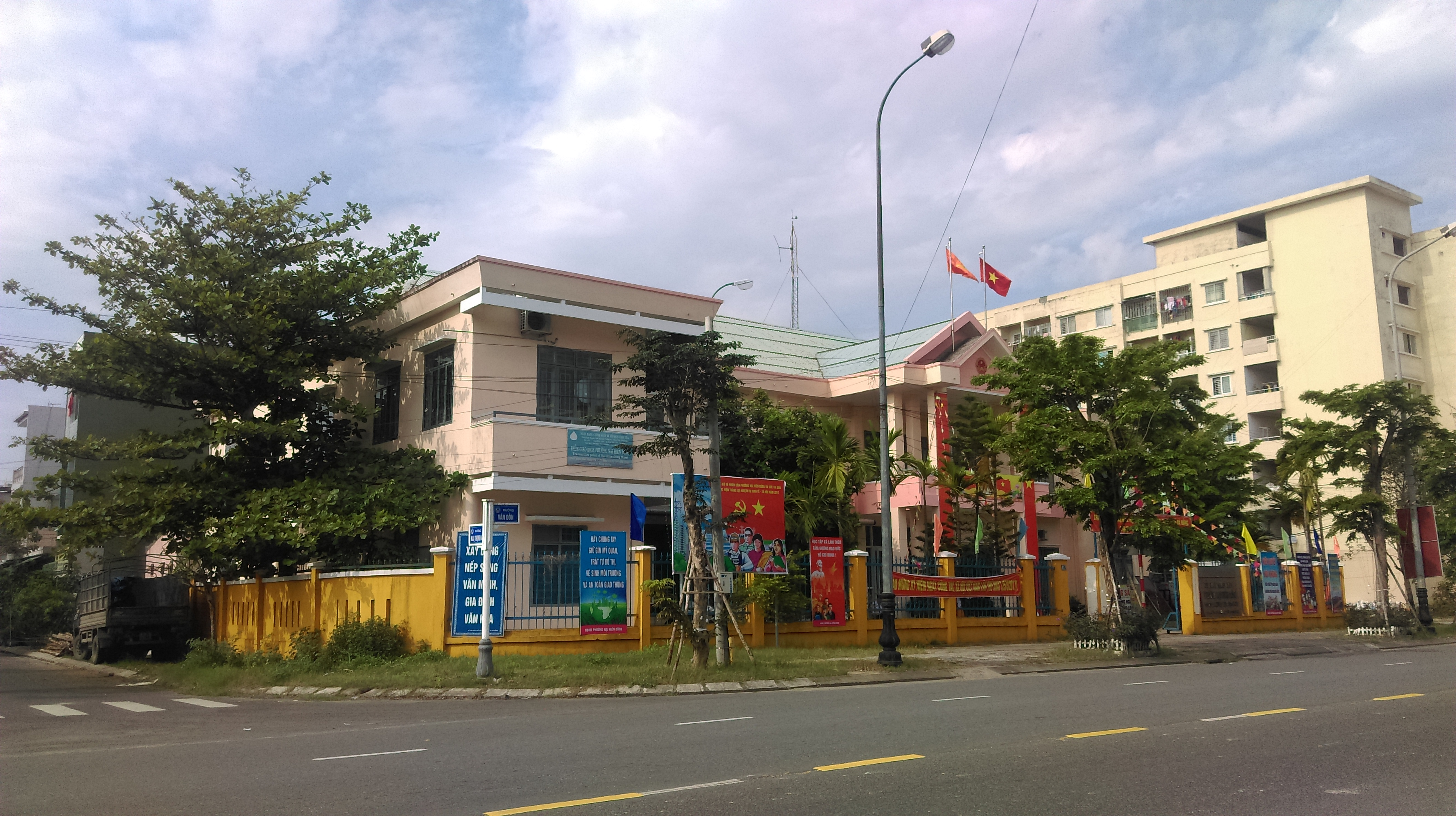 UBND phường Nại Hiên Đông